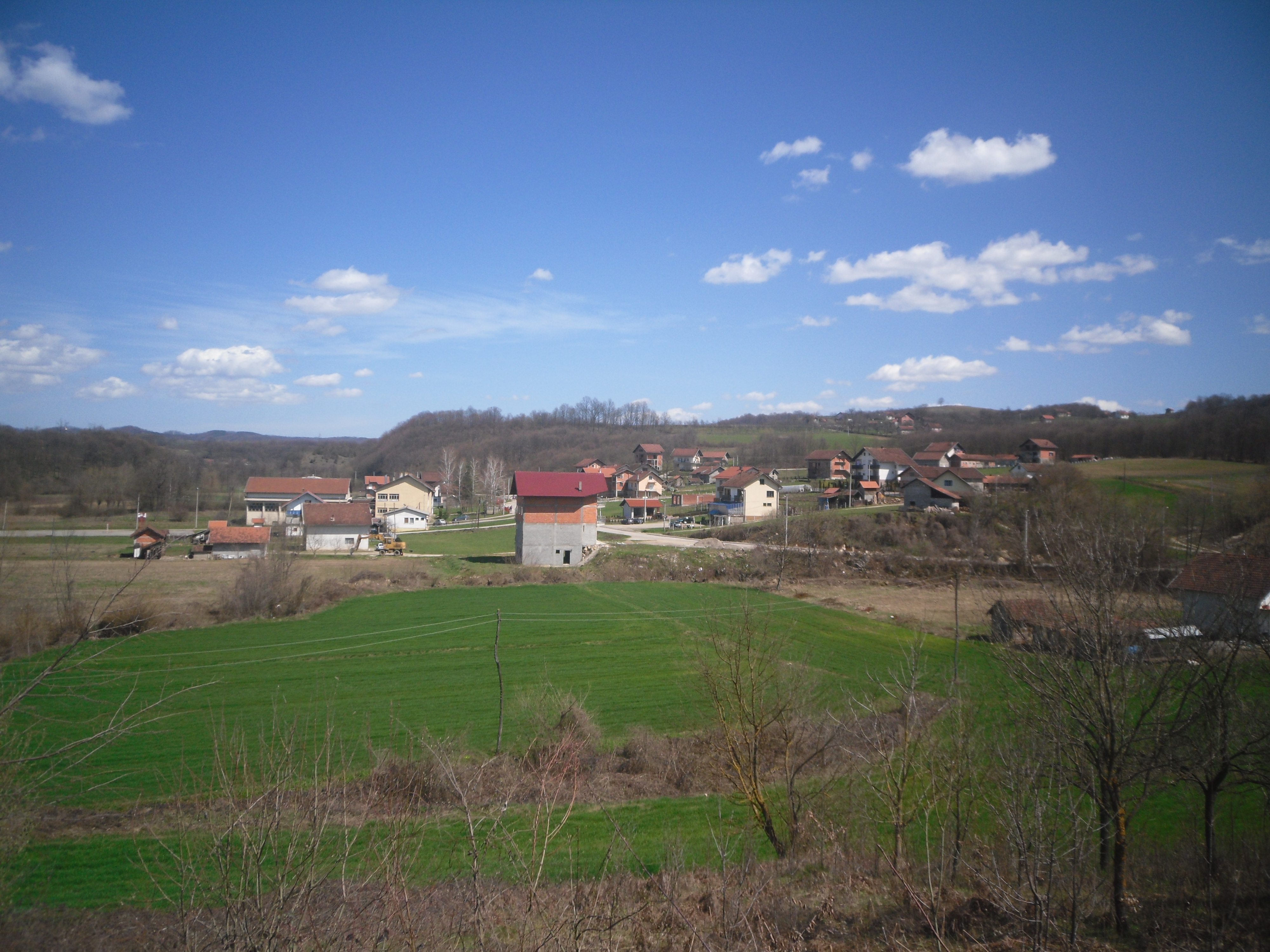 Borkovići (Banja Luka)